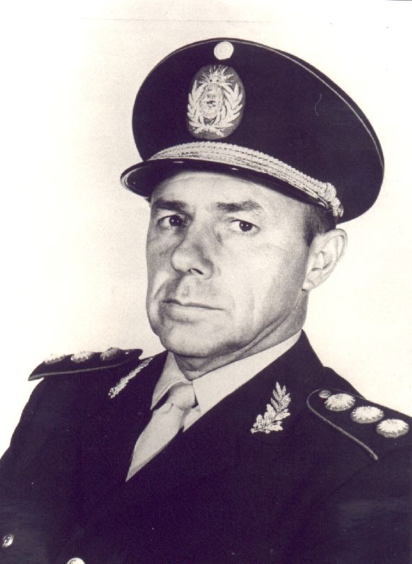 Teniente General Julio Rodolfo Alsogaray.